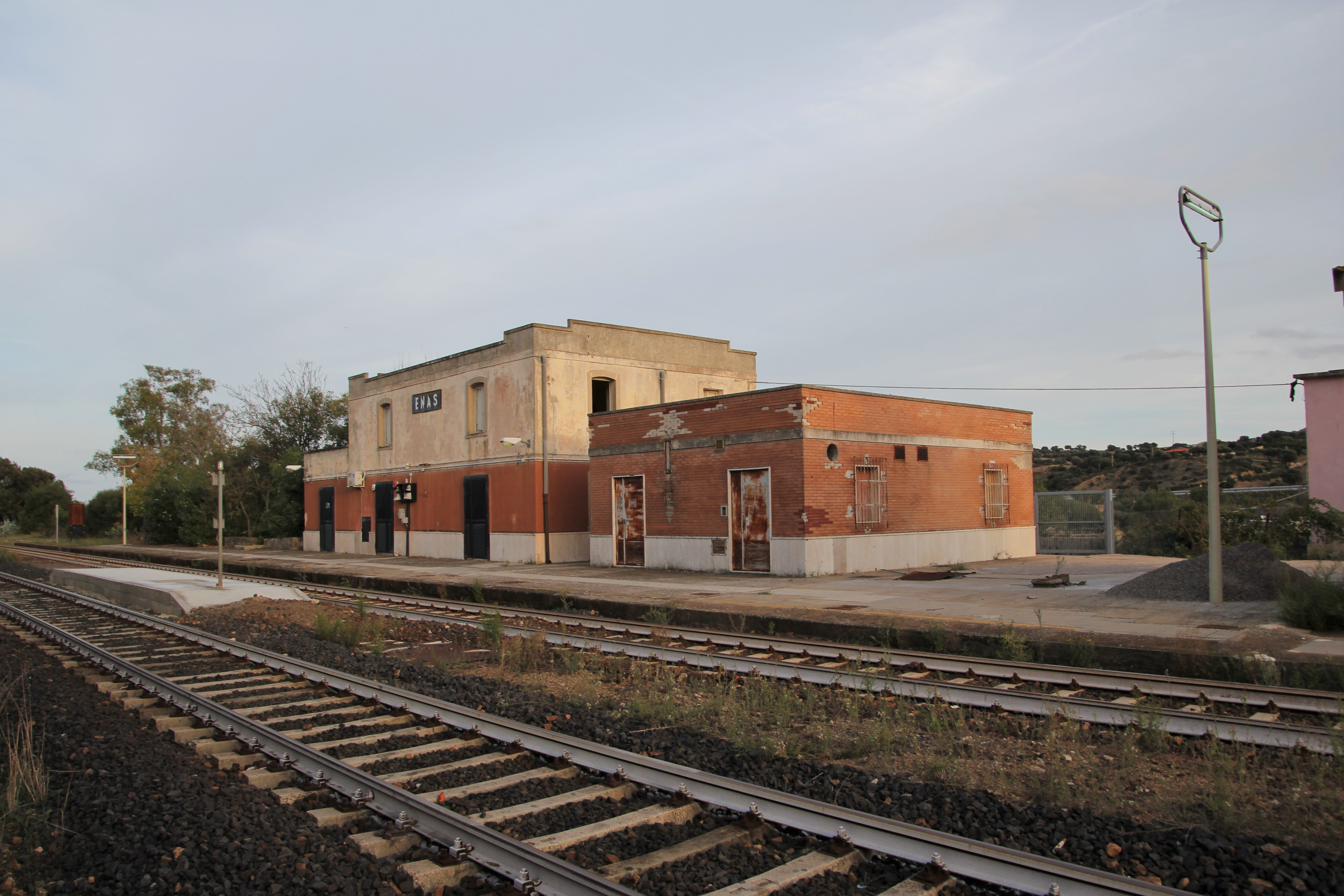 Olbia, stazione ferroviaria di Enas